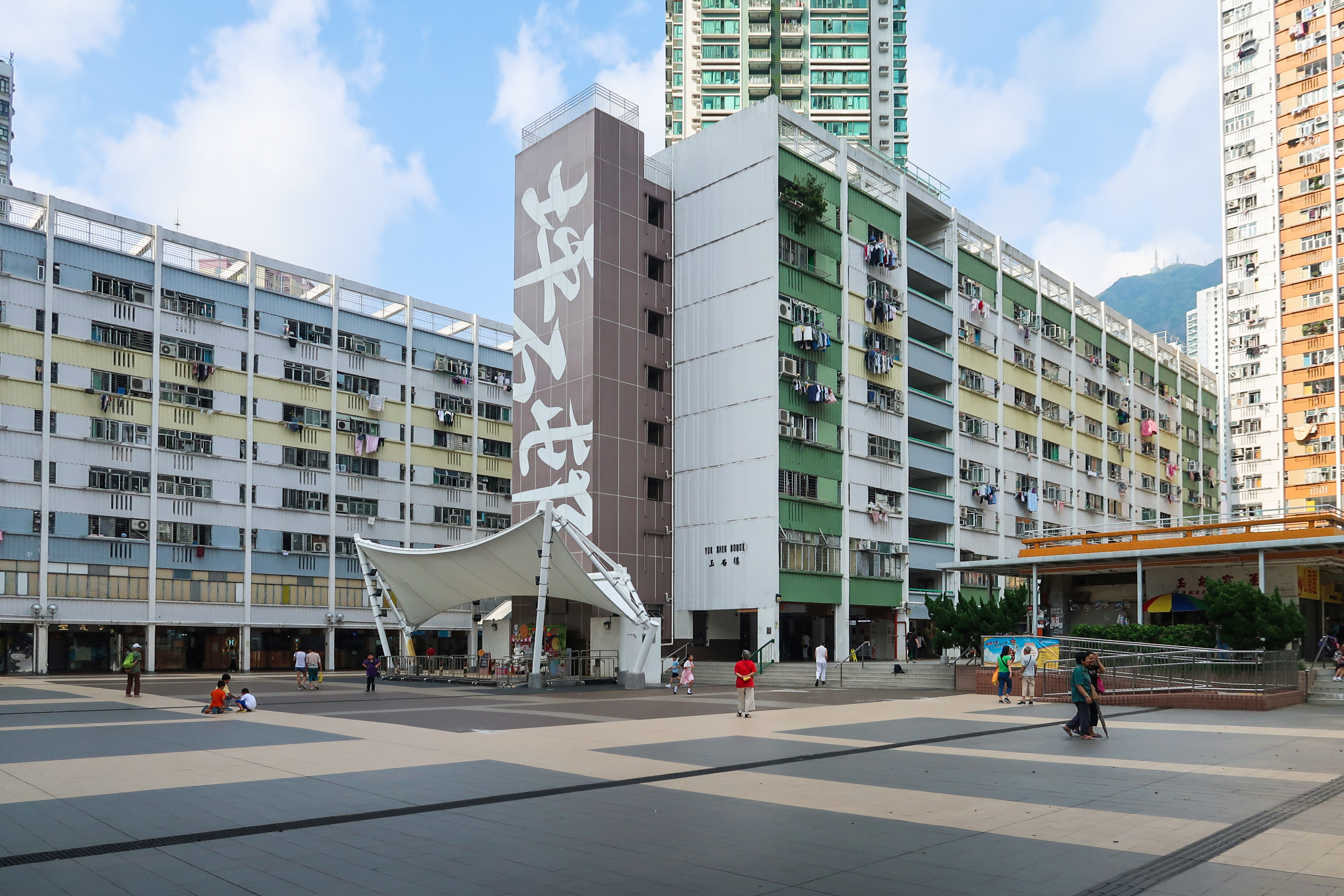 Ping Shek Estate Podium